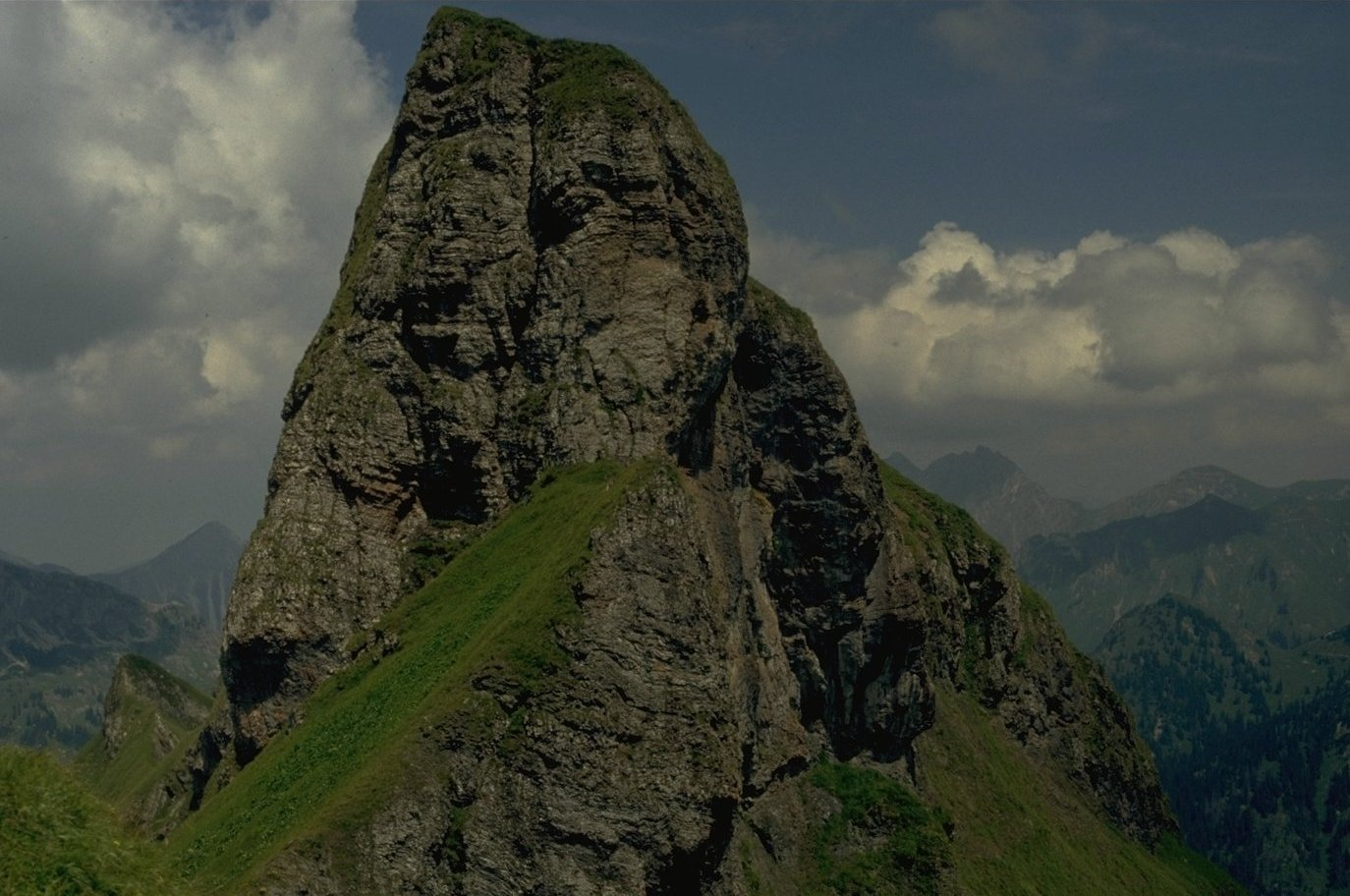 Salober von Südwesten